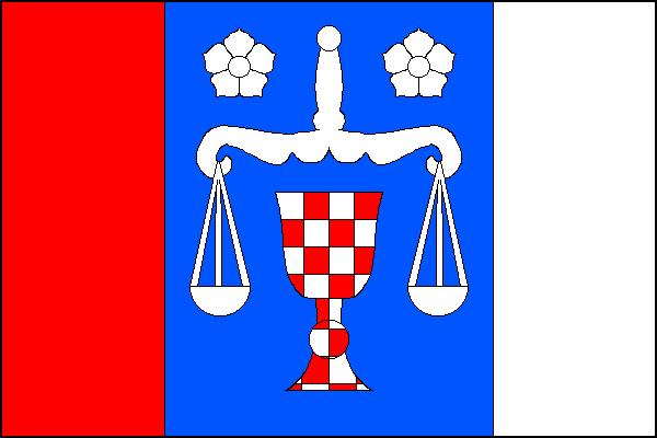 Vlajka obce Liptaň